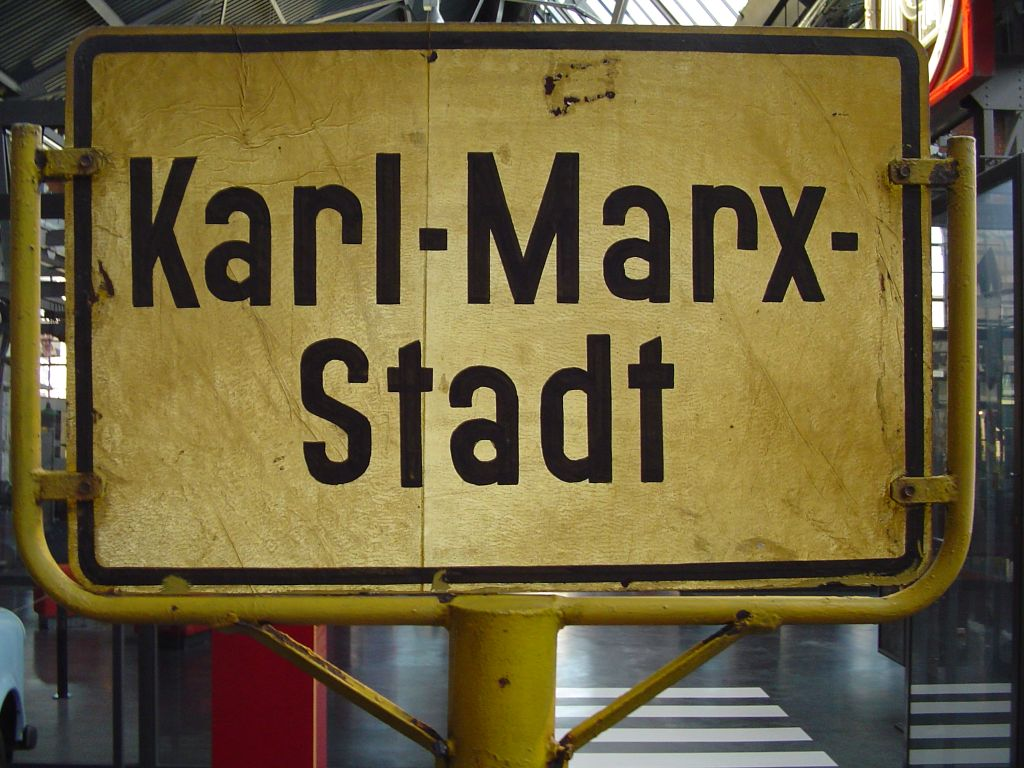 Ehemaliges Ortseingangsschild von Chemnitz damals Karl-Marx-Stadt, aufgenommen im Sächsischen Industriemuseum Chemnitz